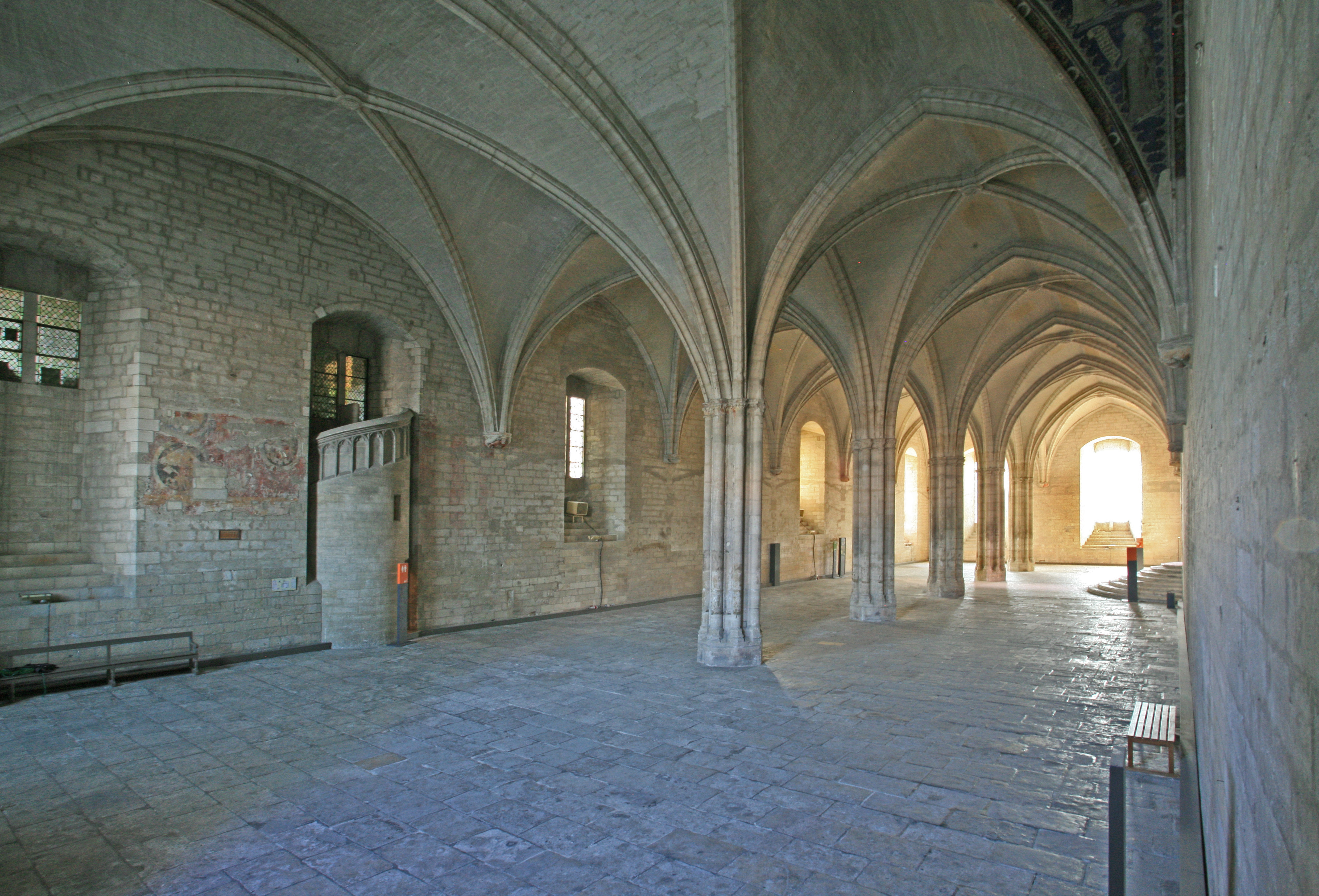 La Grande Audience, Palais des Papes, Avignon, Vaucluse, France